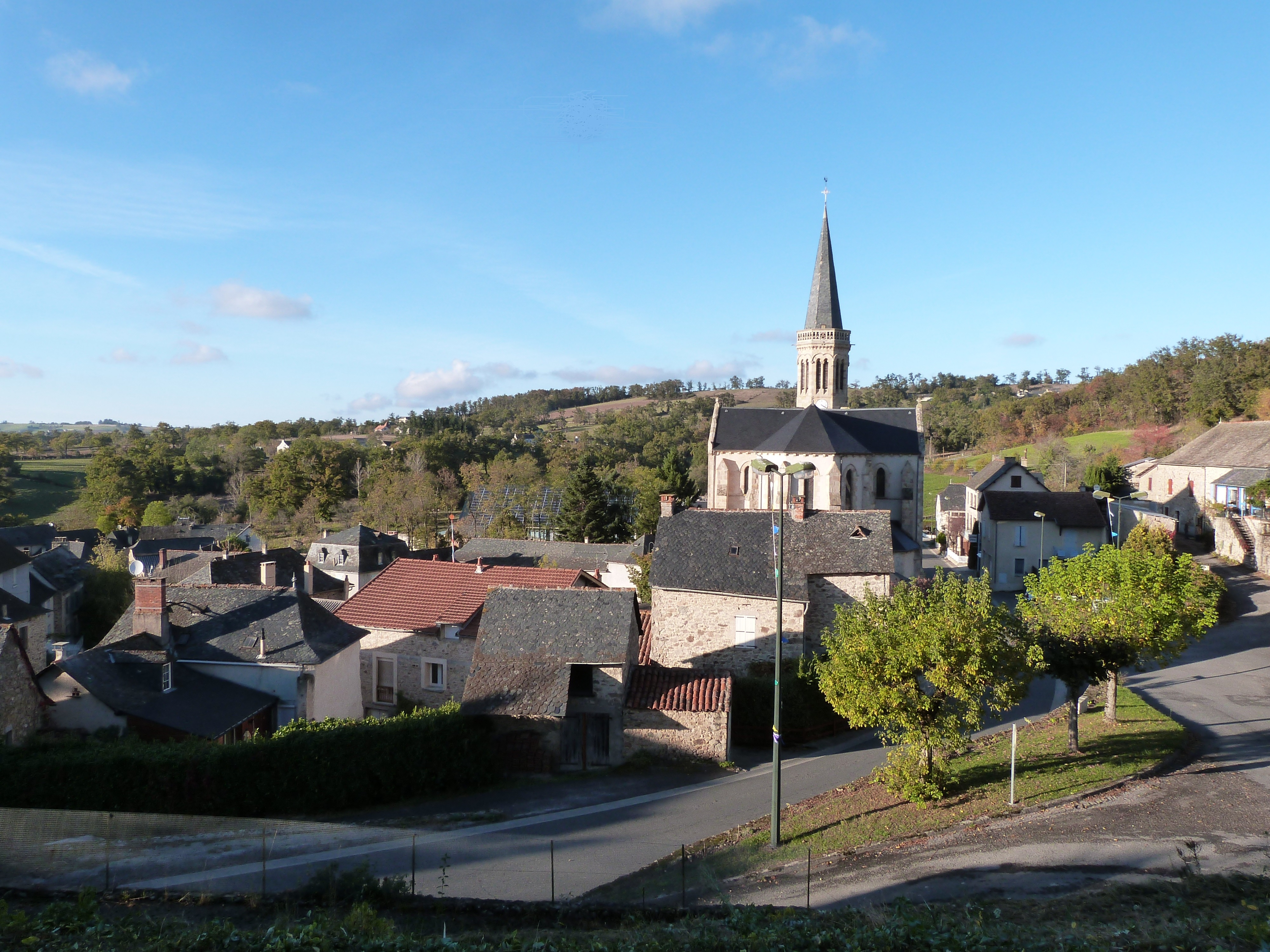 Vue générale de Saint-Salvadou